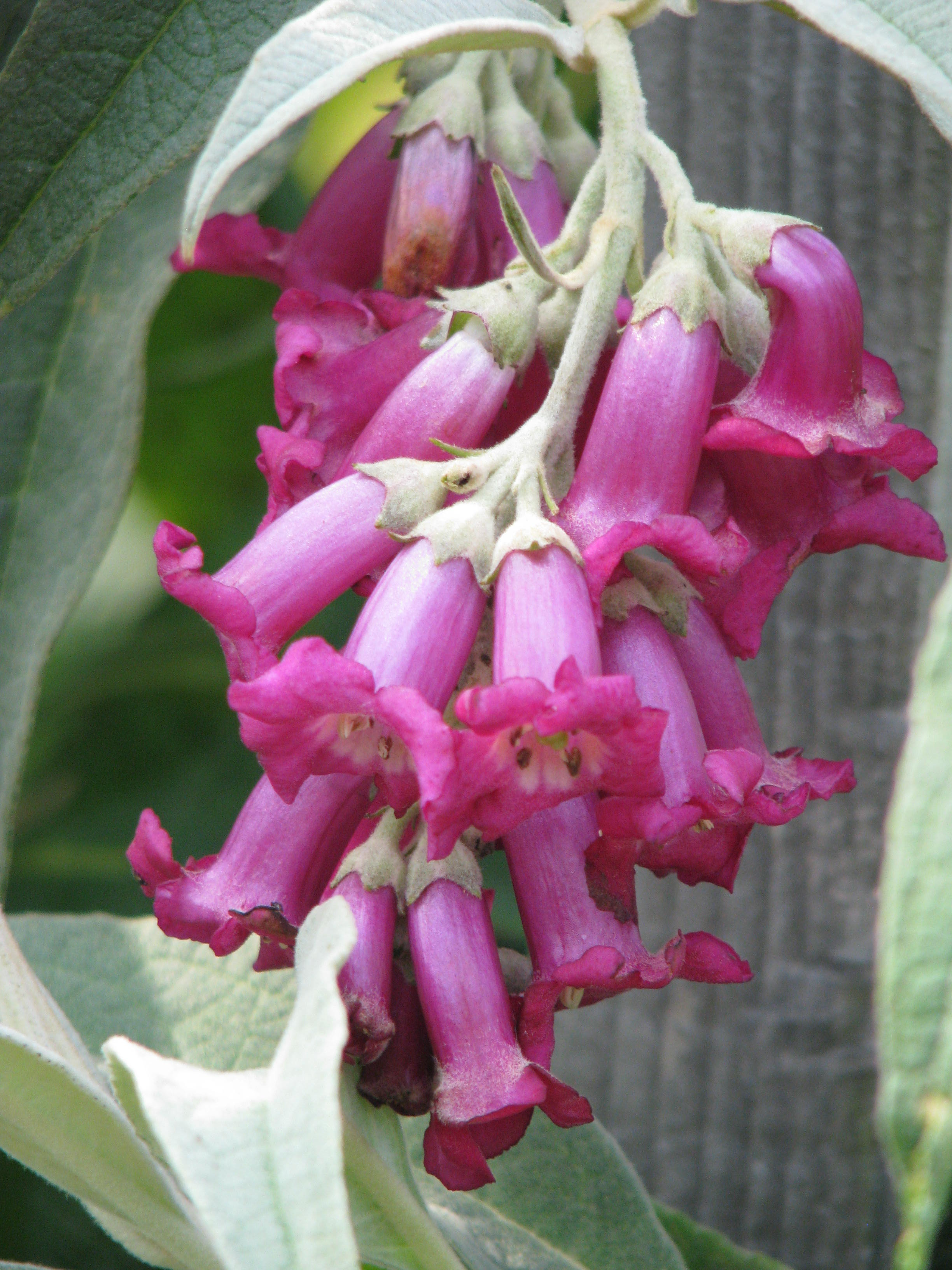 Buddleja colvillei large leaf form